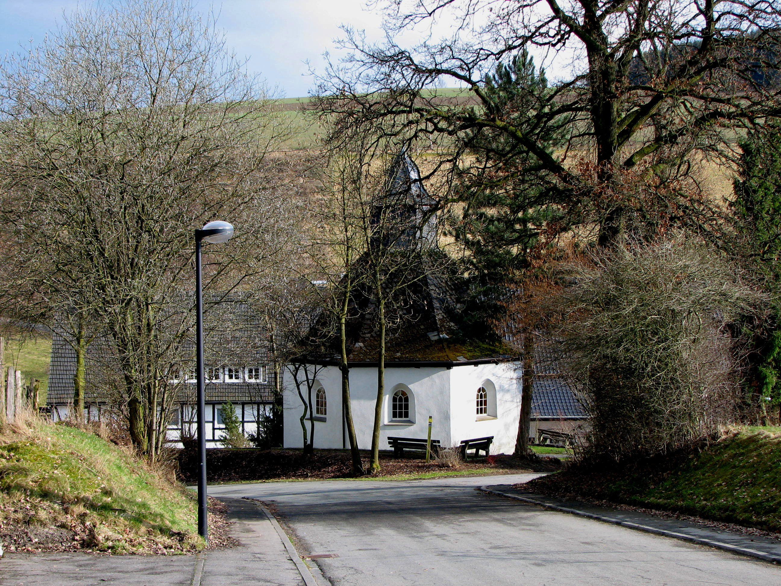 St. Lucia in Meschede-Erflinghausen This is a photograph of an architectural monument.